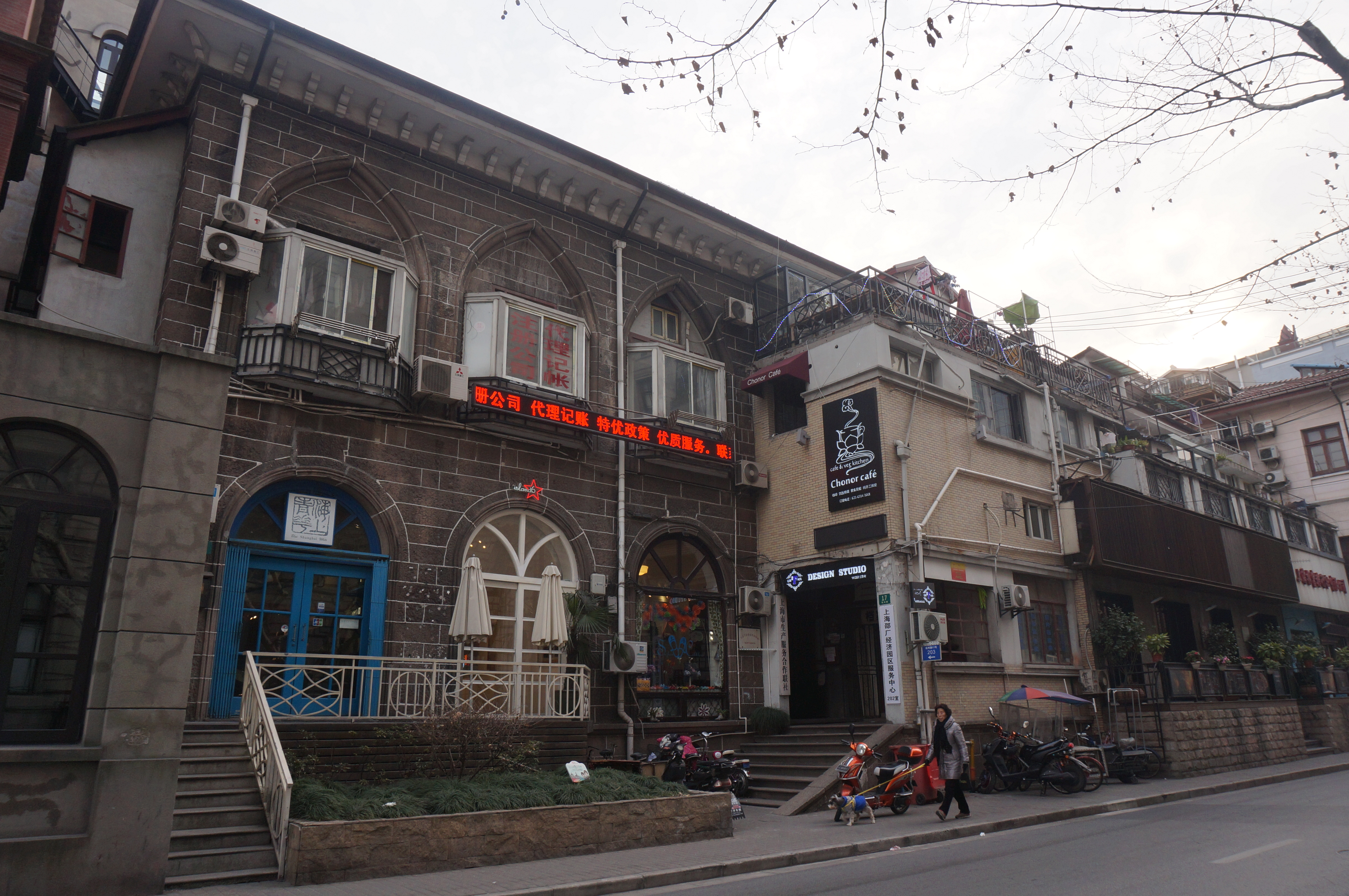 中文（中国大陆）: 上海福州路17、19号 旗昌洋行大楼